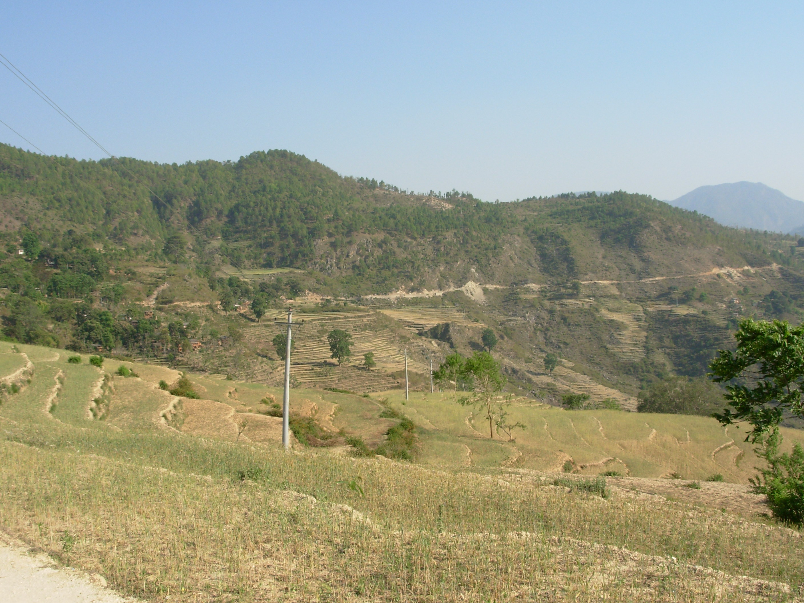 Sanfebagar 10700, Nepal